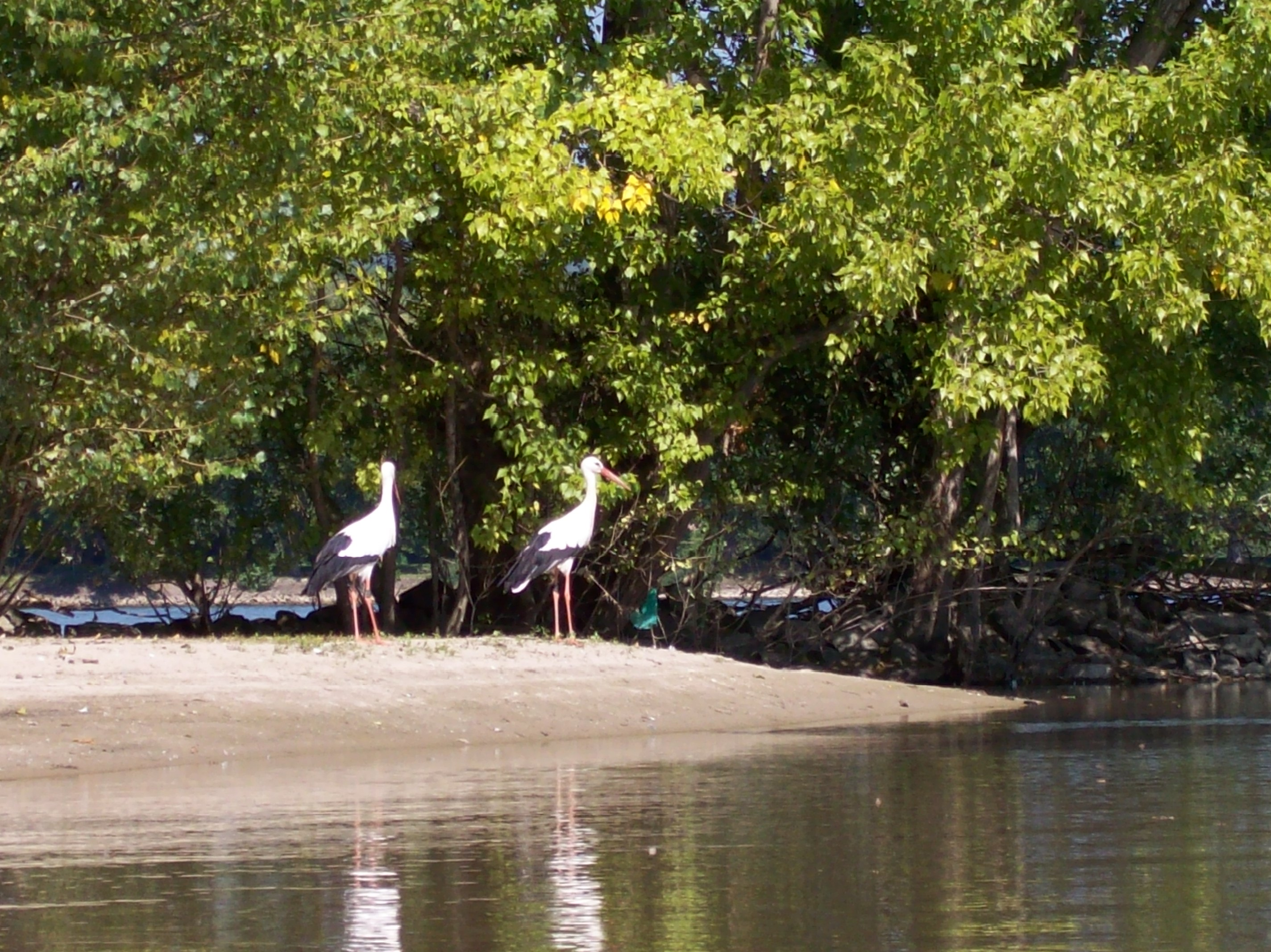 Storchenpaar auf einer Sandbank im Rhein (Ilmenaue, Bingen Gaulsheim)